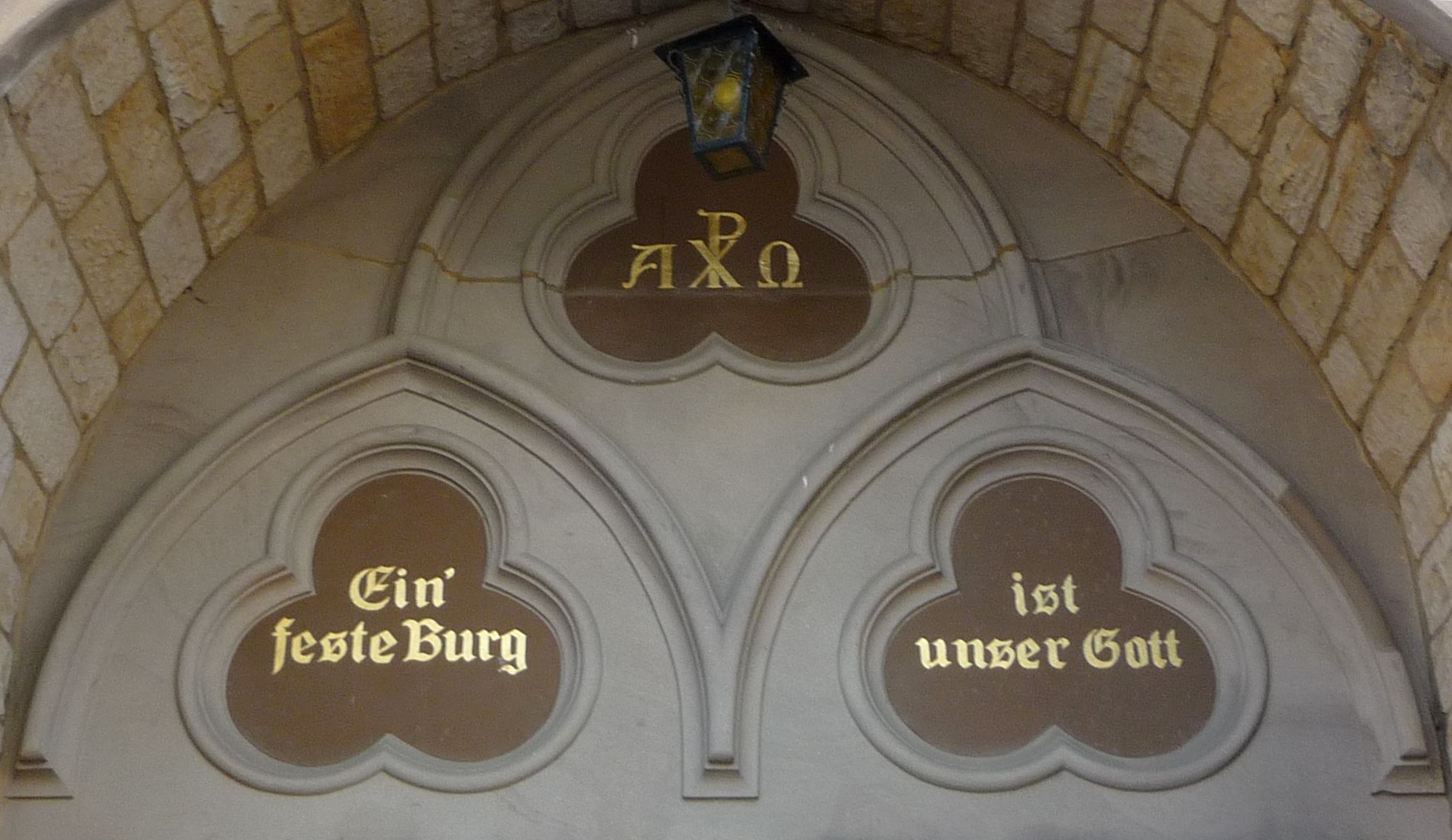 Pauluskirche Ludwigshafen-Friesenheim